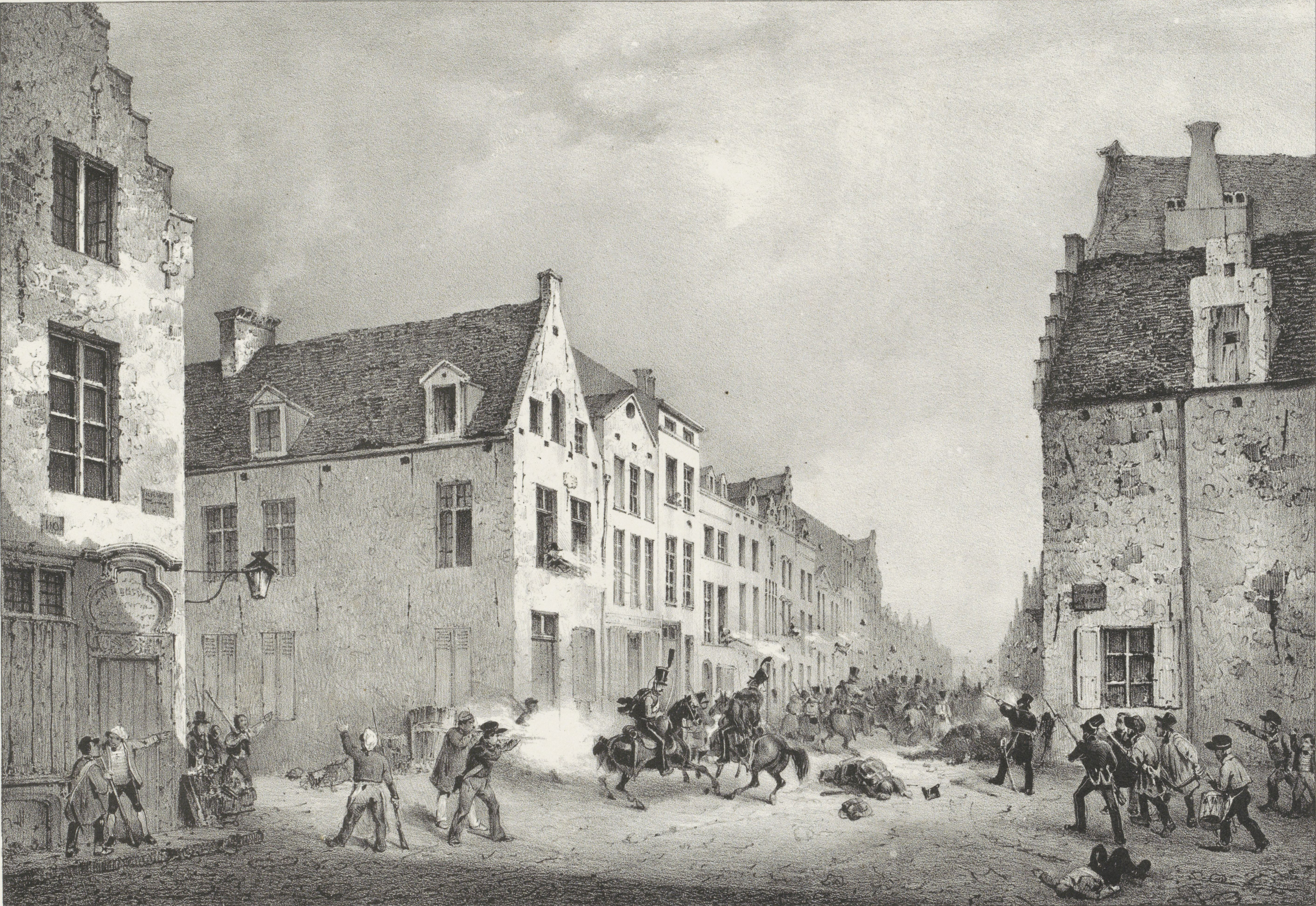 Aftocht van Nederlandse eenheden via de Vlaamsepoort, 23 september 1830